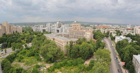 Центр Харькова вид с воздуха